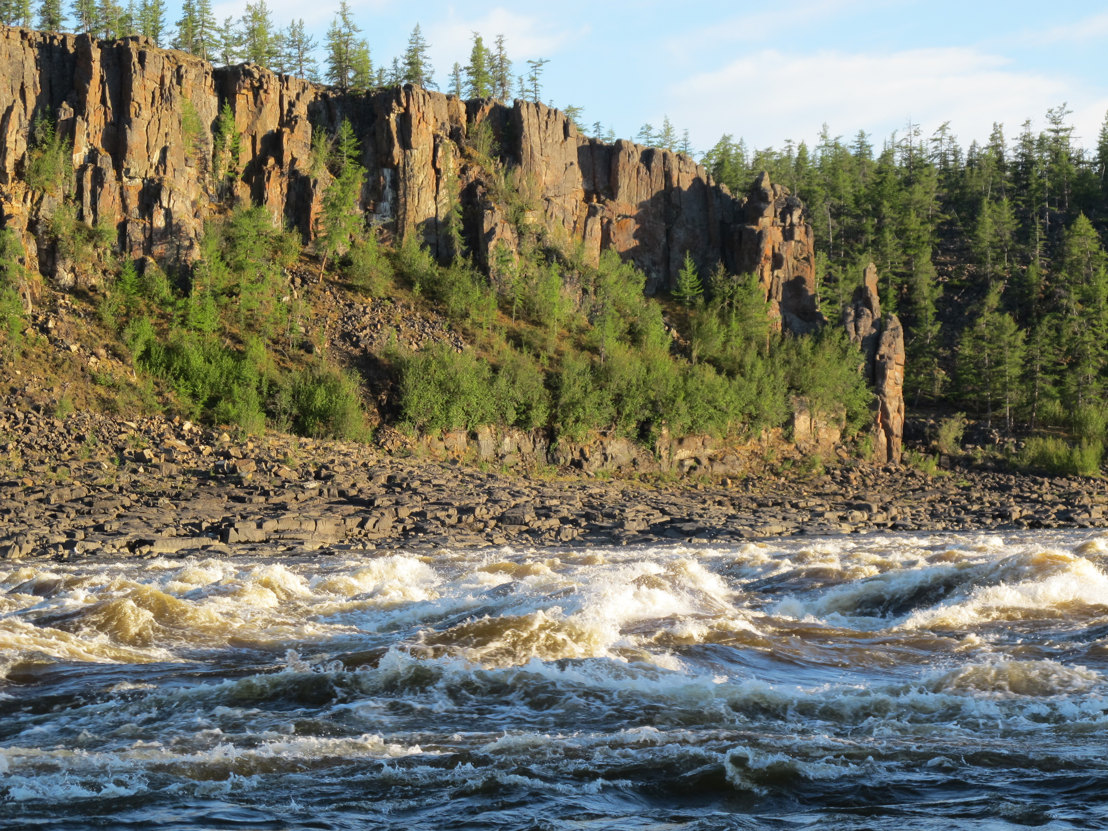 Река Котуй